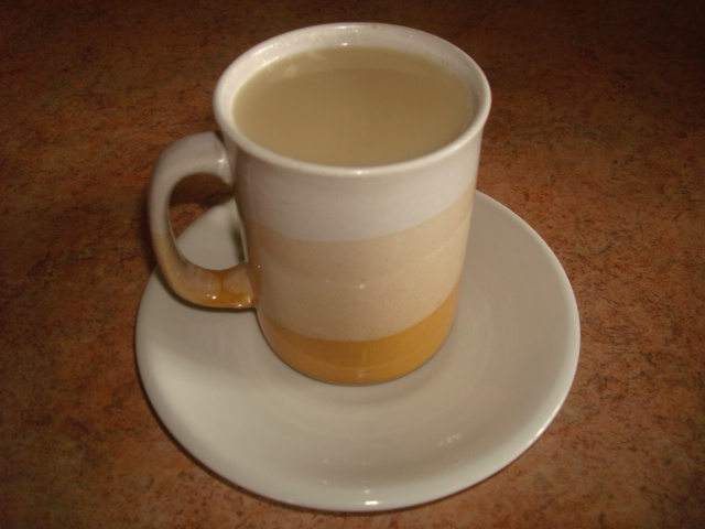 Taza de aguadulce, bebida no fermentada de caña de azúcar, típica de Costa Rica.